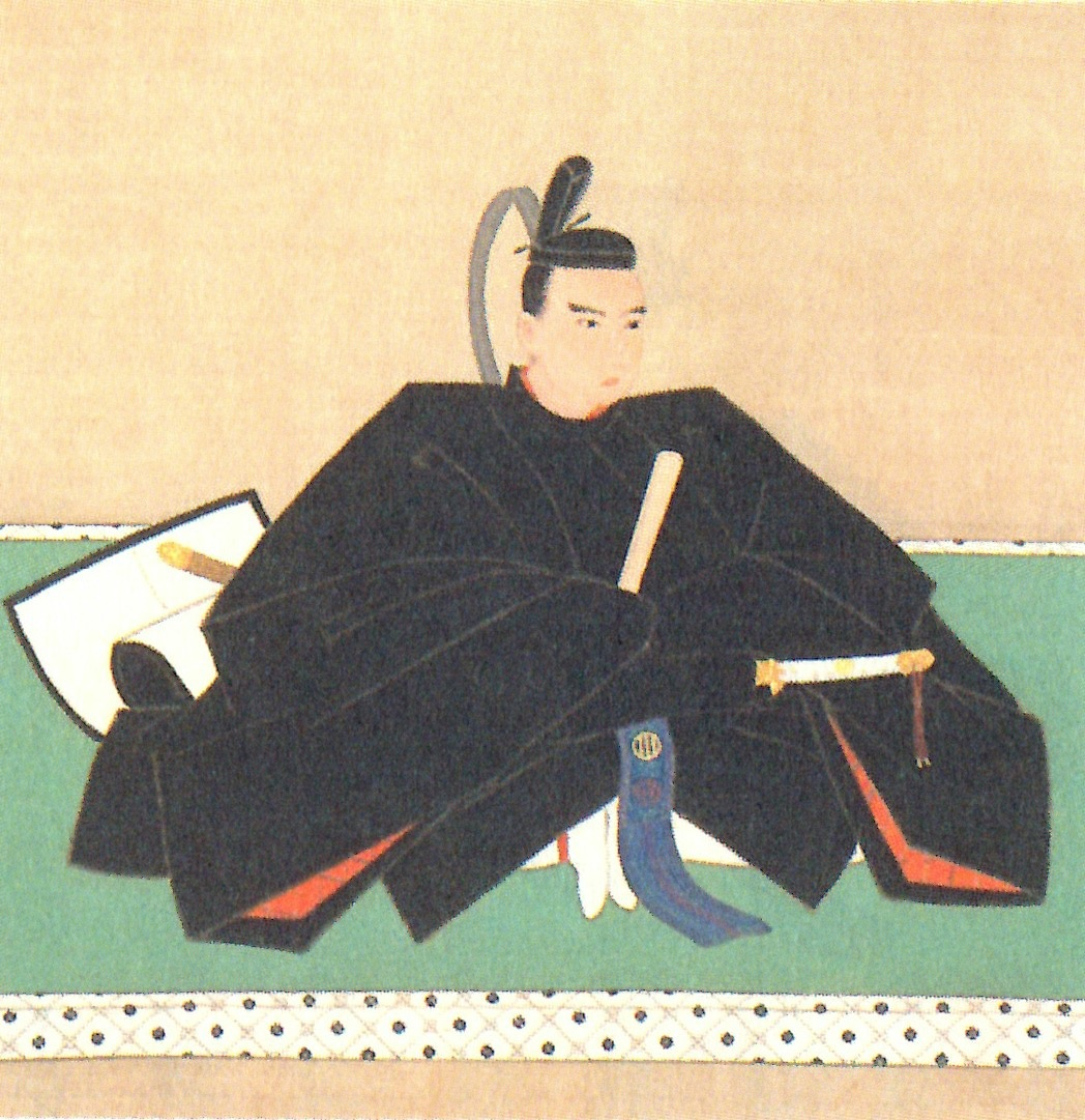 伊達斉義の肖像。